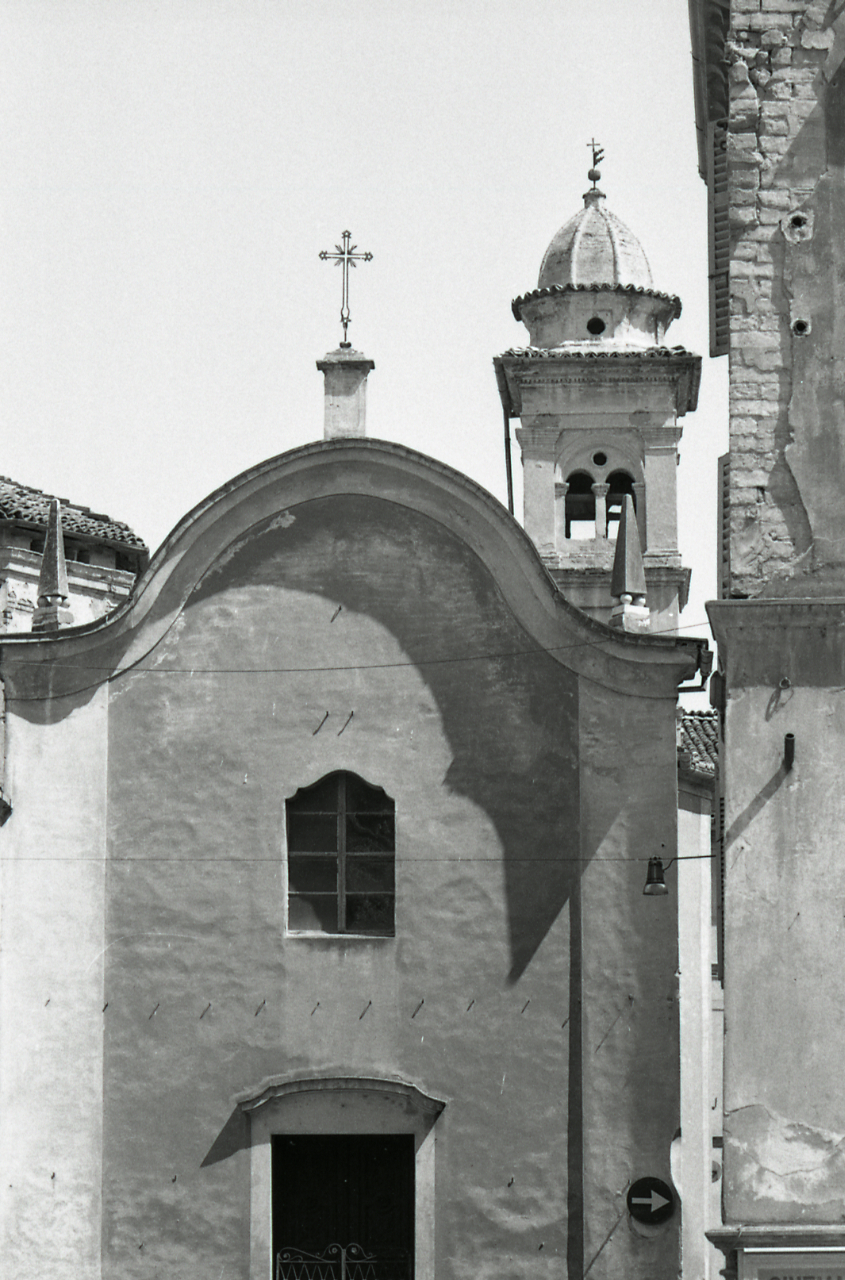 Servizio fotografico : Parma, 1976 / Paolo Monti. - Strisce: 6, Fotogrammi complessivi: 36 : Negativo b/n, gelatina bromuro d'argento/ pellicola ; 35 mm. - ((Sul portanegativi: N[I]K[MA]T FP4. - Occasione: Documentazione monumenti artistici Emilia-Romagna. - Fonte: Agenda di Paolo Monti: Leica 1501-3000 Controllo numerazione (1950-1978), presso Archivio Paolo Monti. - Fonte: Fattura di Paolo Monti: IV. Commesse/ Fattura n. 09/ Fotografie monumenti artistici Emilia-Romagna (1976/07/05), presso Archivio Paolo Monti